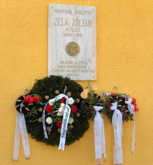 Placă memorială Zelk Zoltán, Valea lui Mihai